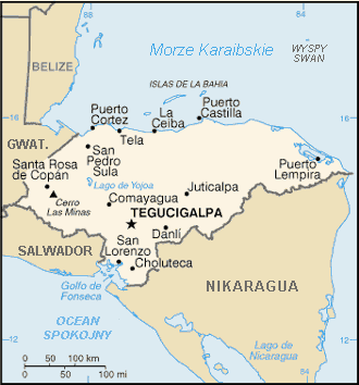 Mapa Hondurasu z CIA (wersja spolszczona)